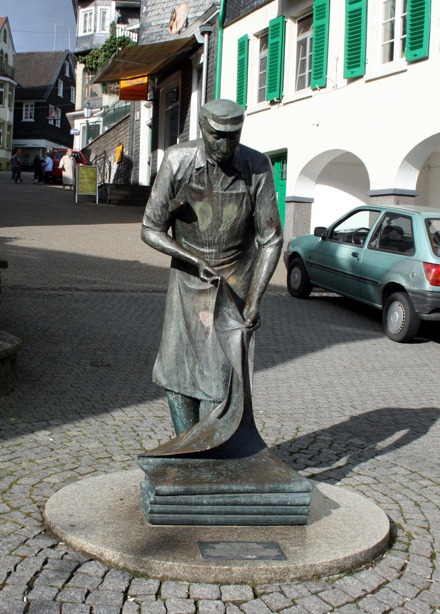 Tuchweberdenkmal auf der Islandstraße in Hückeswagen im September 2007